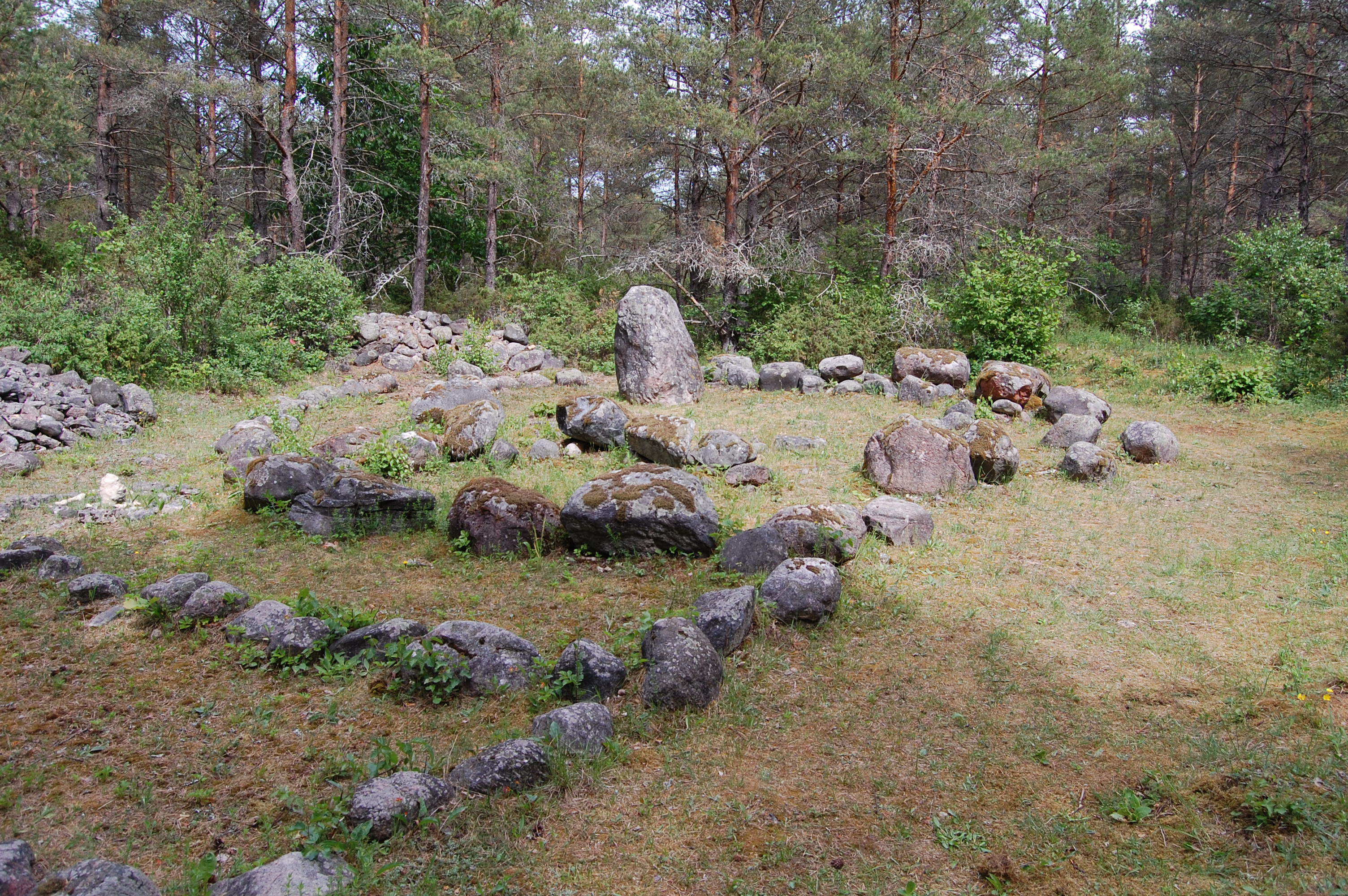 Mäla kalmed Muhus